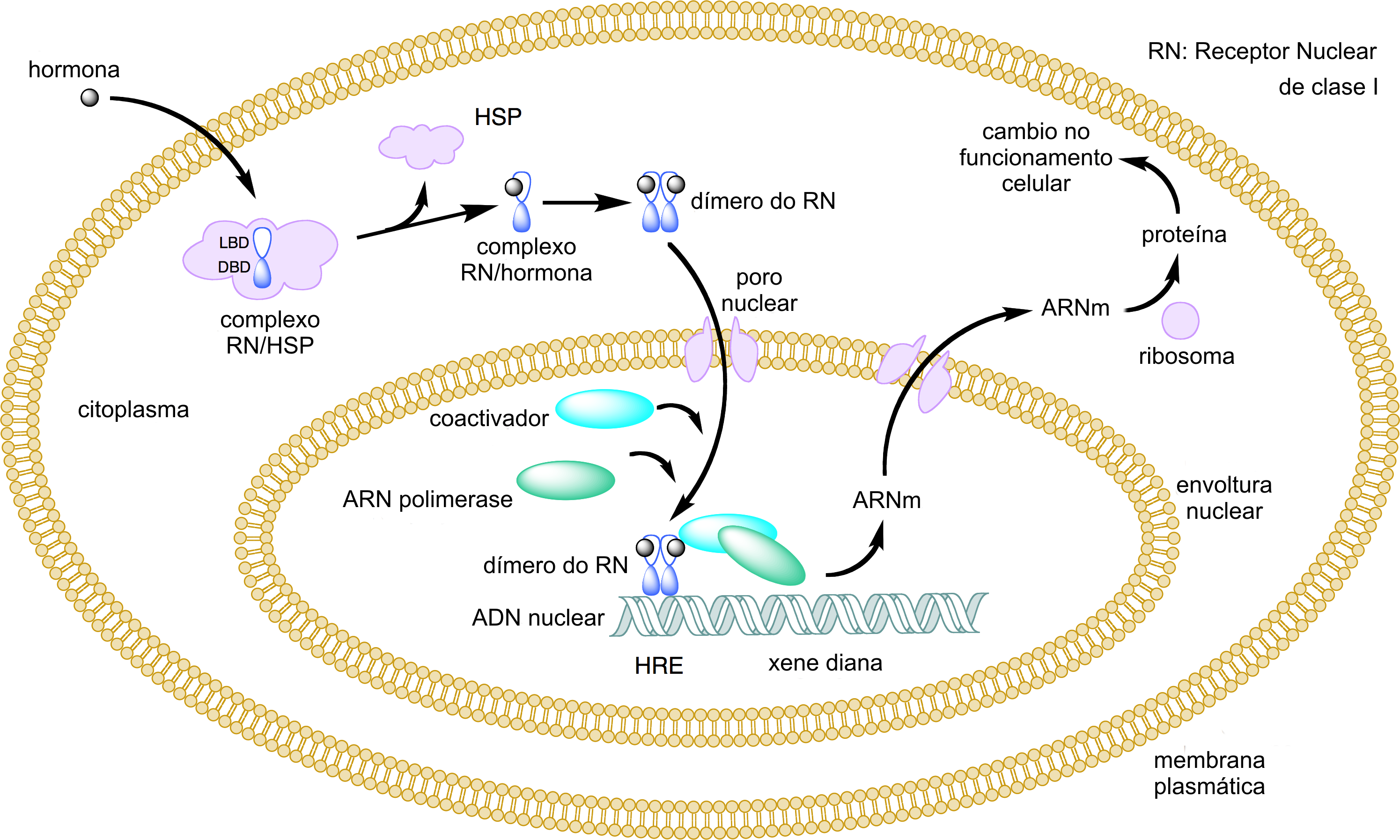 Mecanismo dos receptores nucleares de clase I